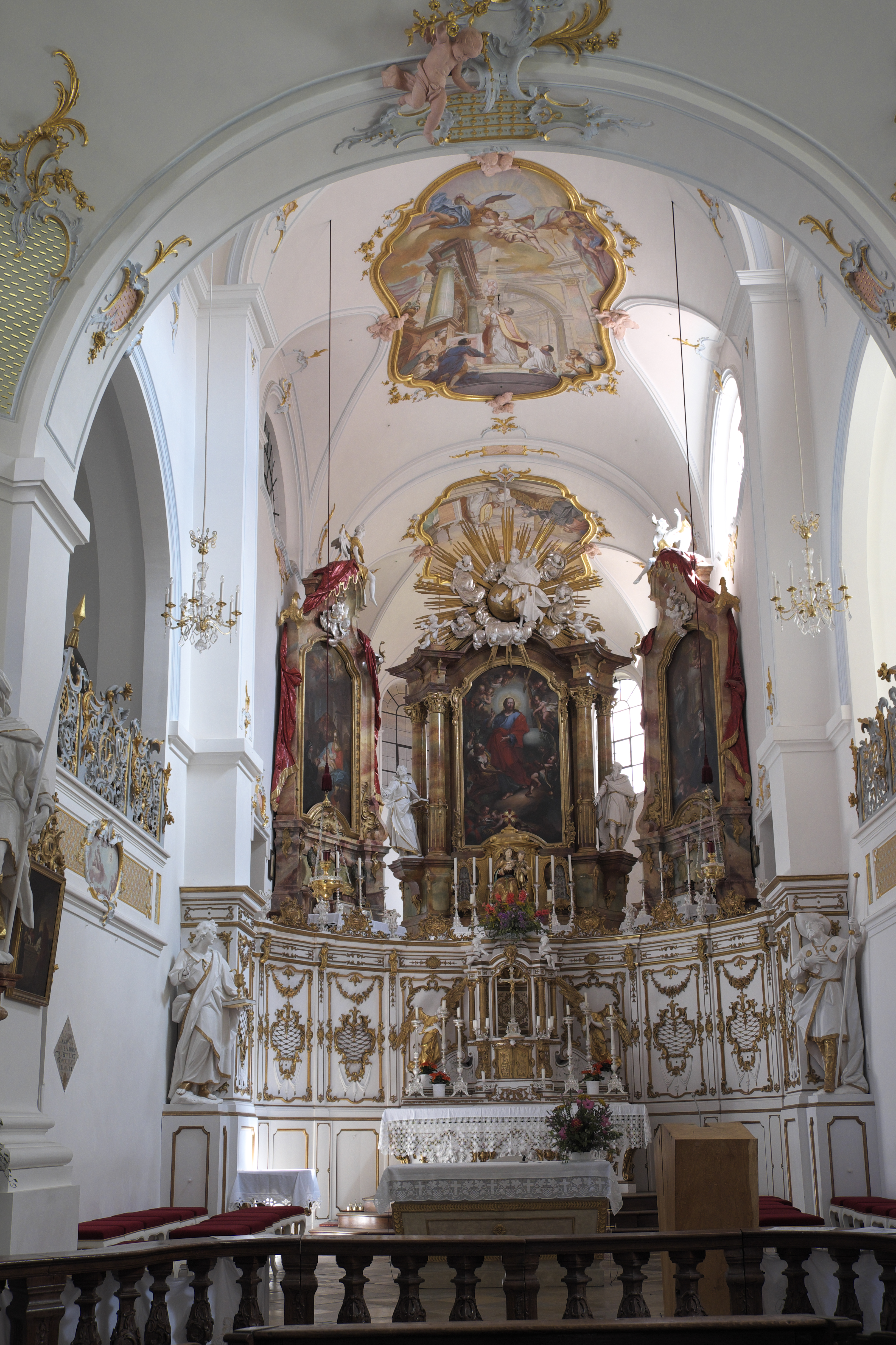 Katholische Pfarr- und Klosterkirche St. Alto und St. Birgitta in Altomünster im Landkreis Dachau (Bayern), Altarraum